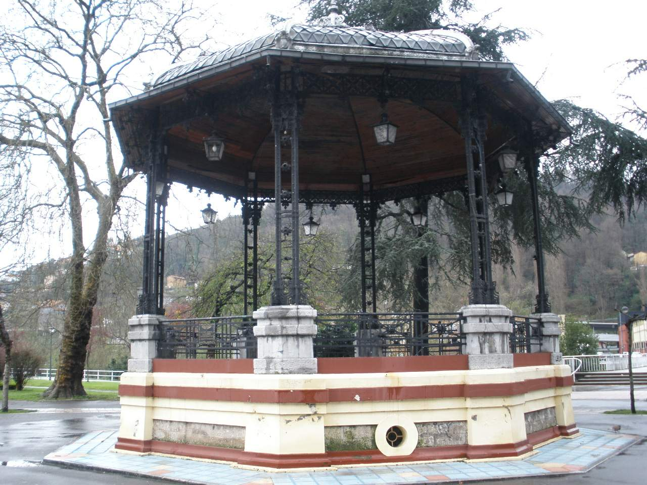 Paisaje urbano en Sama de Langreo (Asturias)